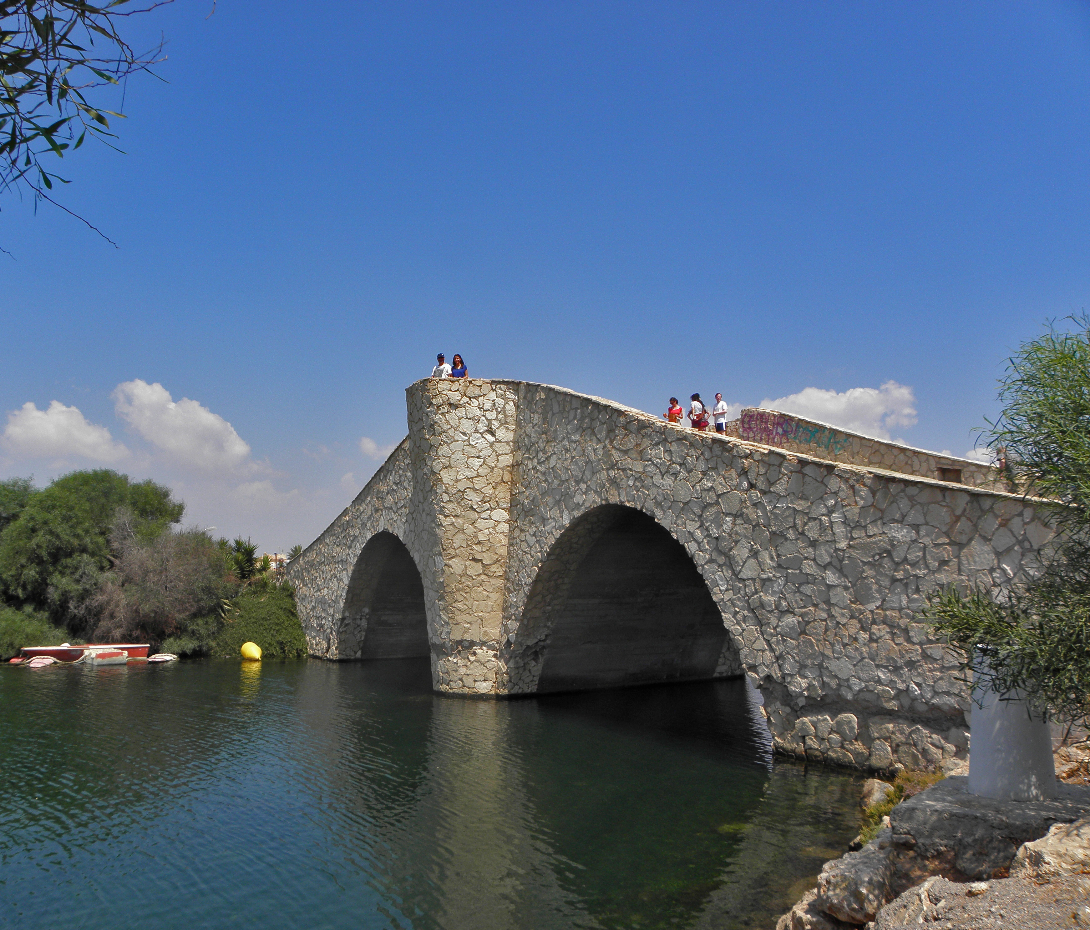 Esta foto participa en el juego En otro lugar de Flickr. Si no perteneces al grupo, no contestes, por favor. Si quieres contestar, únete